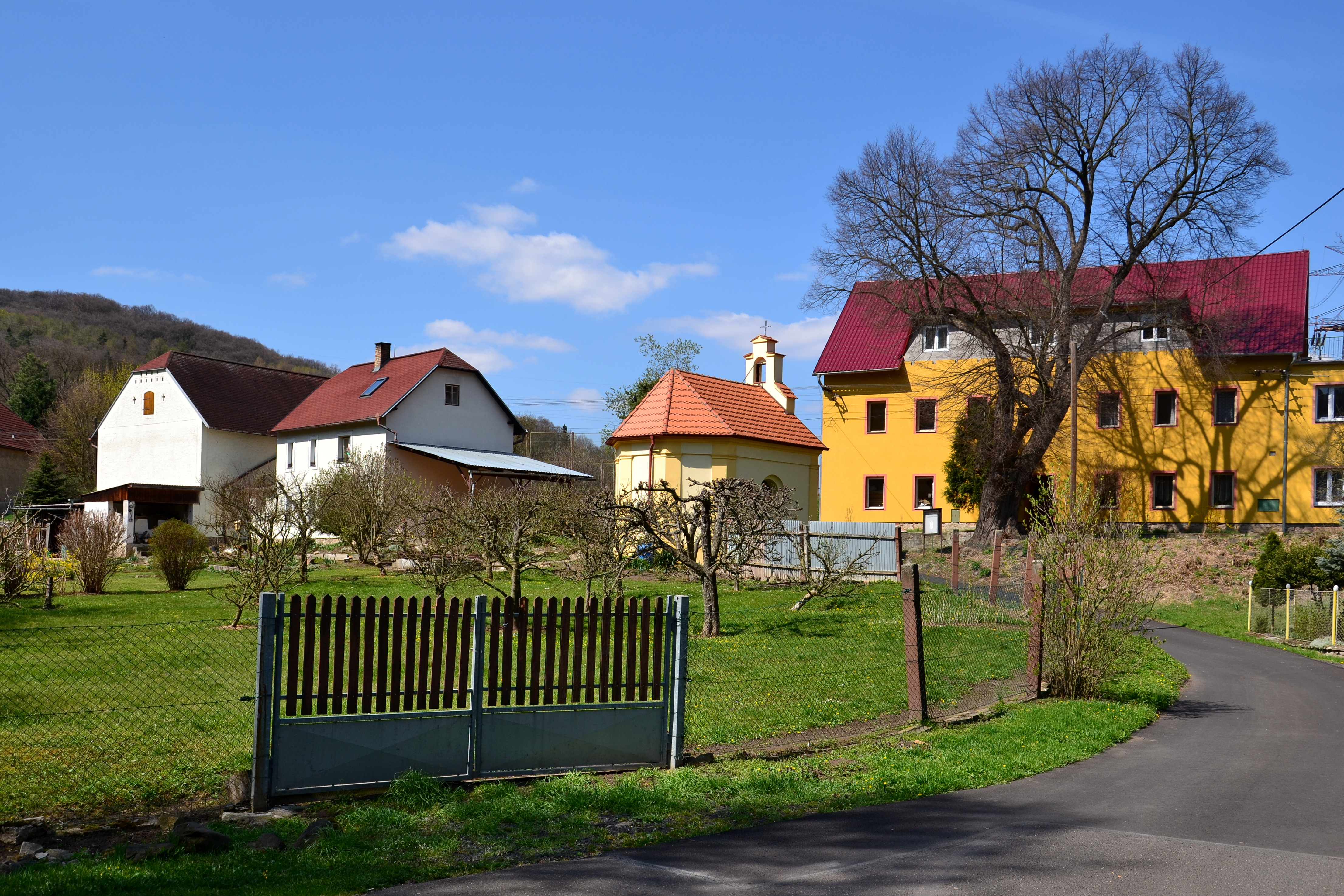 Střed vesnice s kaplí